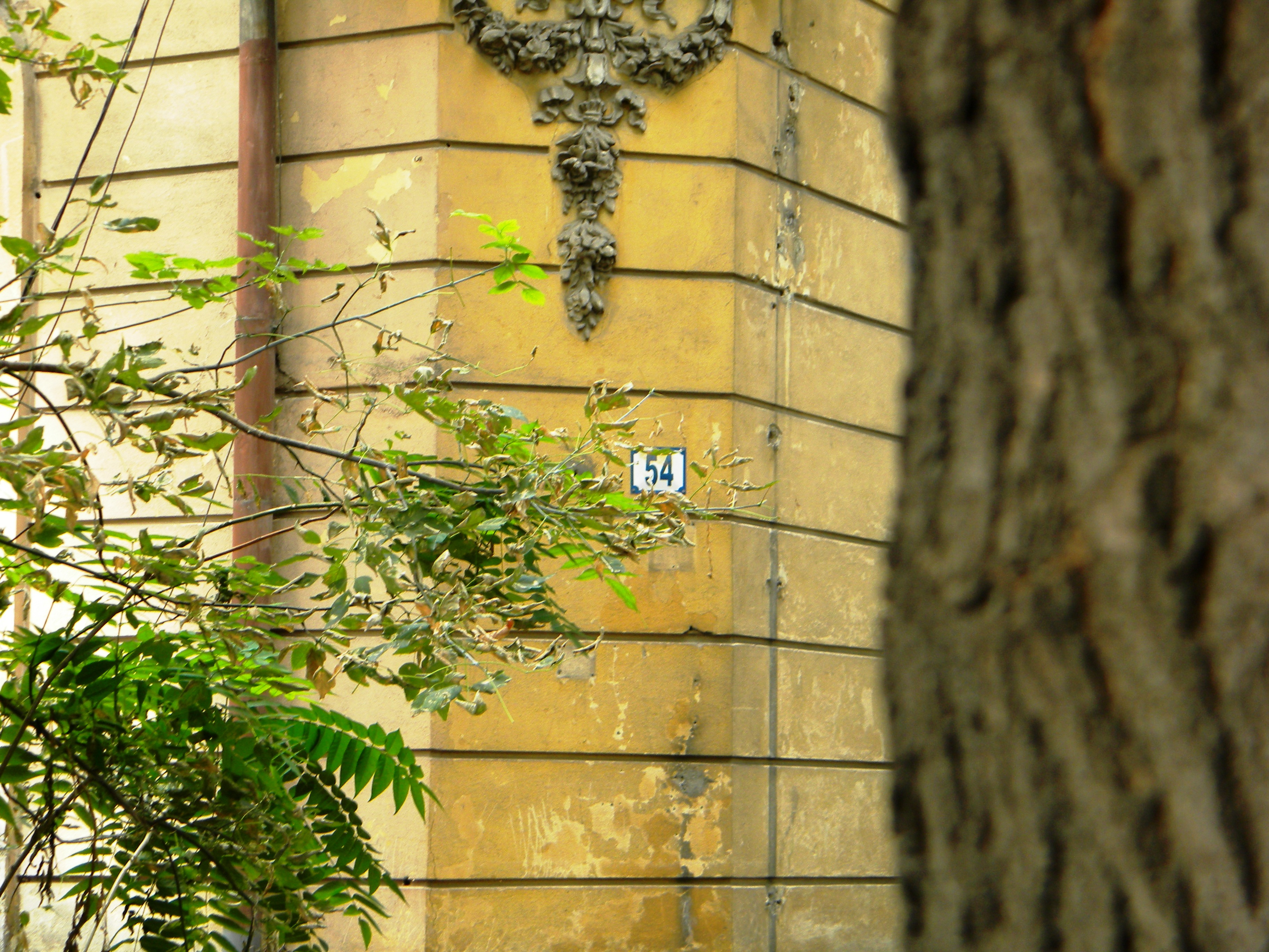 Bucuresti, Romania, Casa pe Calea Plevnei nr. 54, sect. 1 (detaliu 1) (casa prof. Nicolae Clinciu)